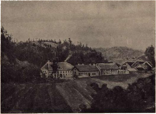 Gården Buskerud på slutten av 1860-tallet. Maleri av amtsingeniør kaptein Anton M. Bergh.